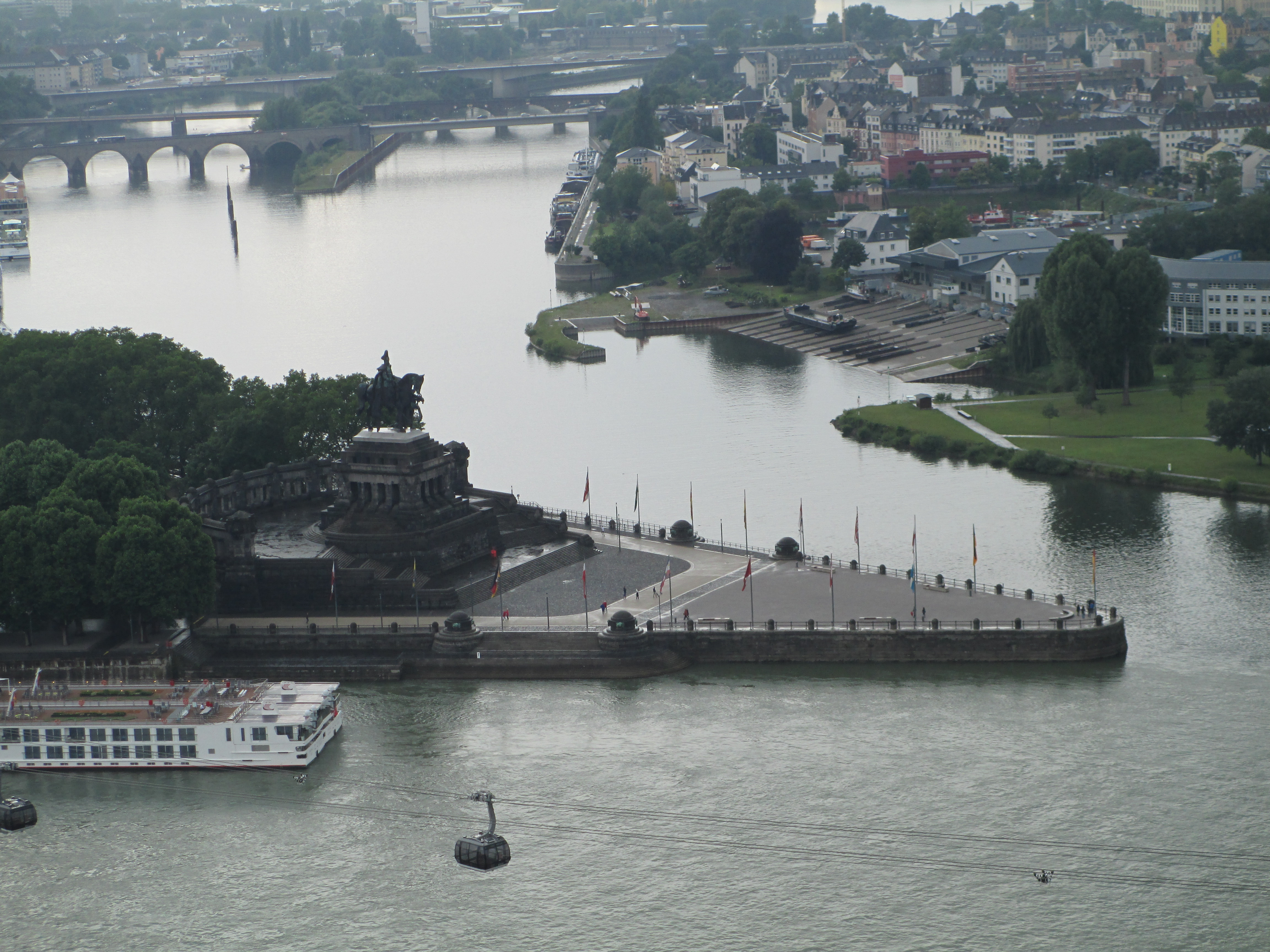 הפינה הגרמנית בקובלנץ